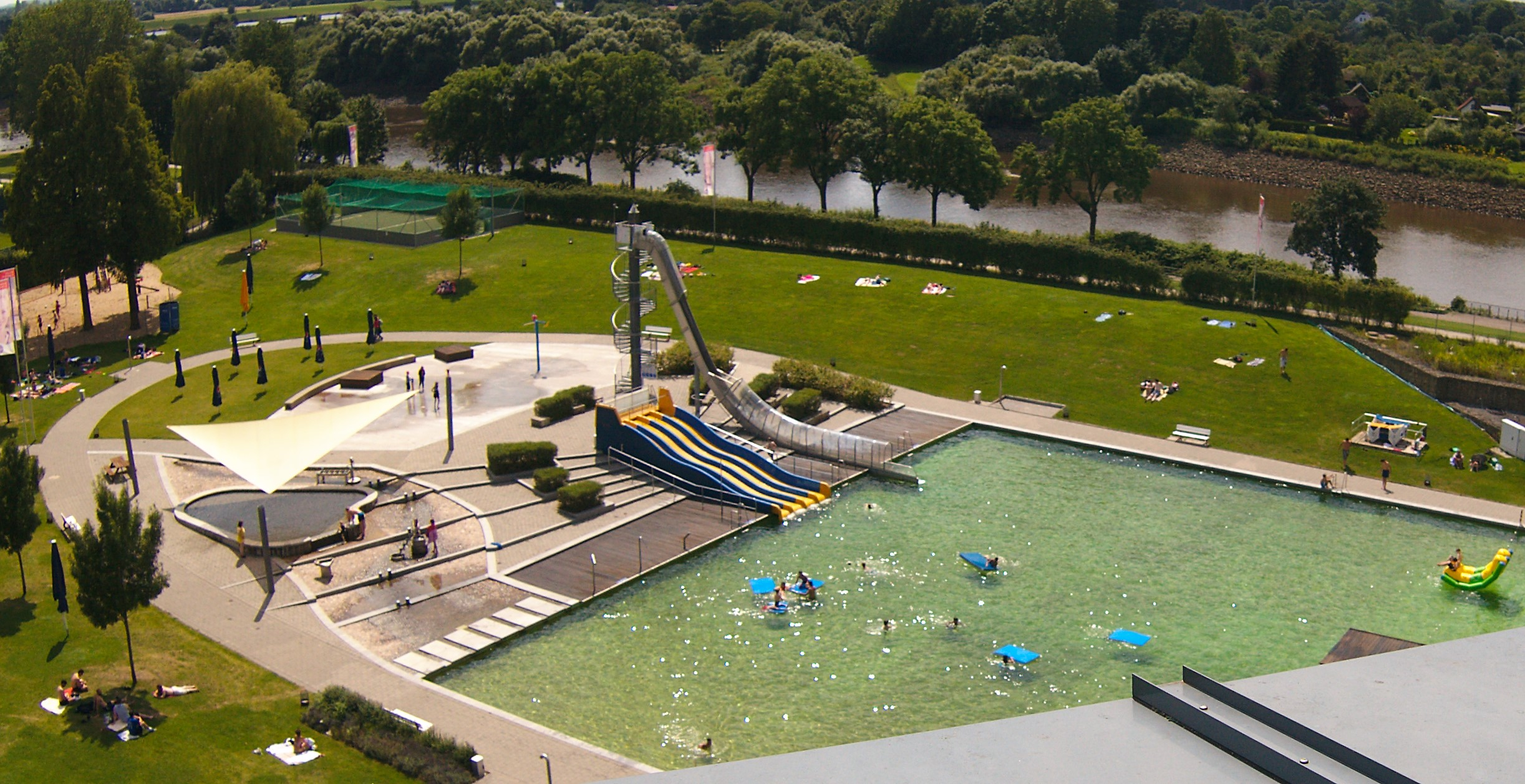 Bremen-Östliche Vorstadt:Teilbereich des Stadionbads mit u. a.: Naturbadebereich mit Nichtschwimmerbecken, Rutschen, Kleinkindbecken, Wasserspielplatz, Liegewiesen (Teil), Beachvolleyballfeld (mitte links) und Soccer-Court (hinten links). Hinter dem Freibadgelände der obere und untere Wagenbrettweg (auf bzw. an dem Sommerdeich) und die Weser.Blick vom Dach des Weserstadions.